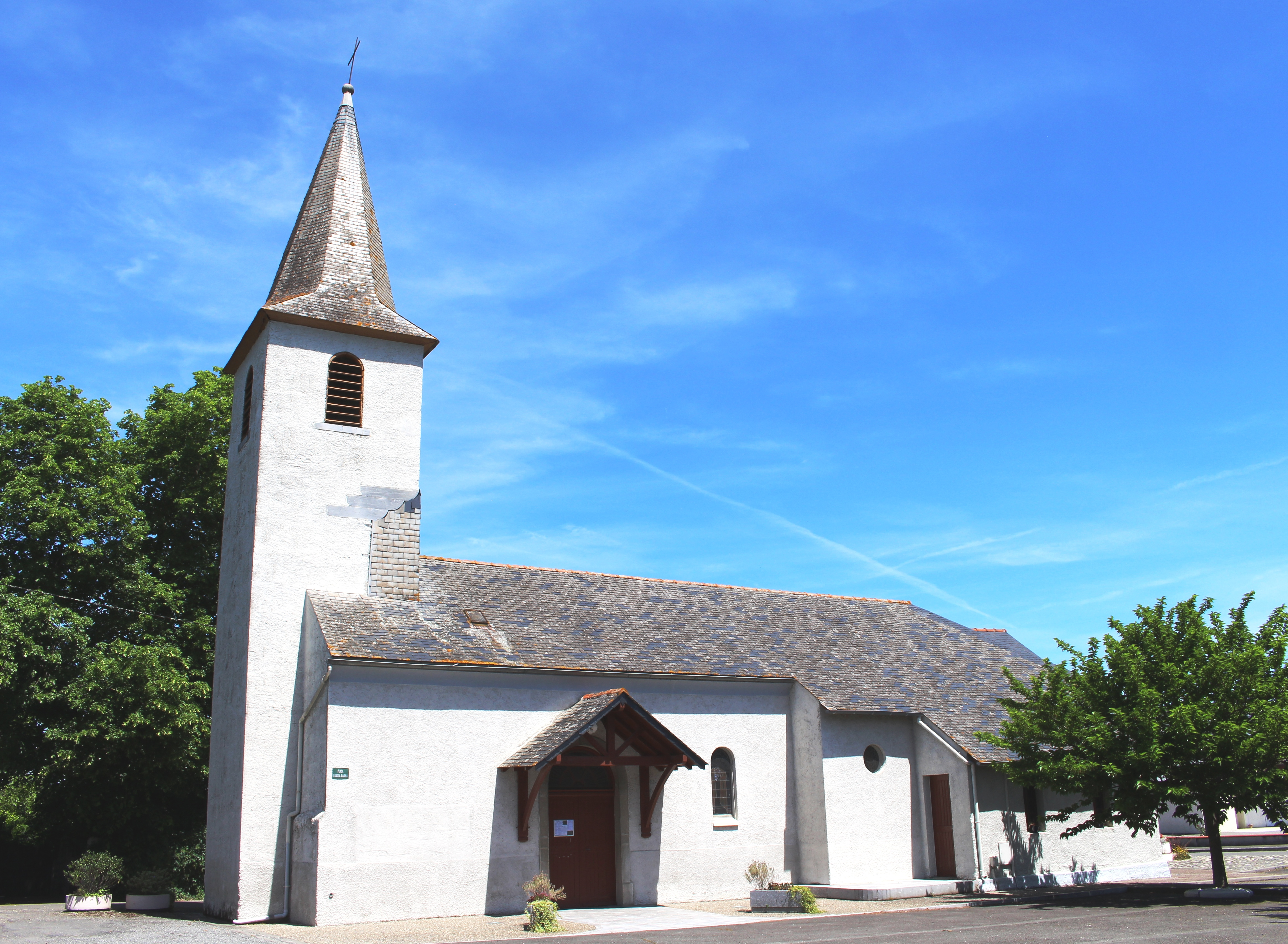 Église Notre-Dame-de-l'Assomption de Chis (Hautes-Pyrénées)